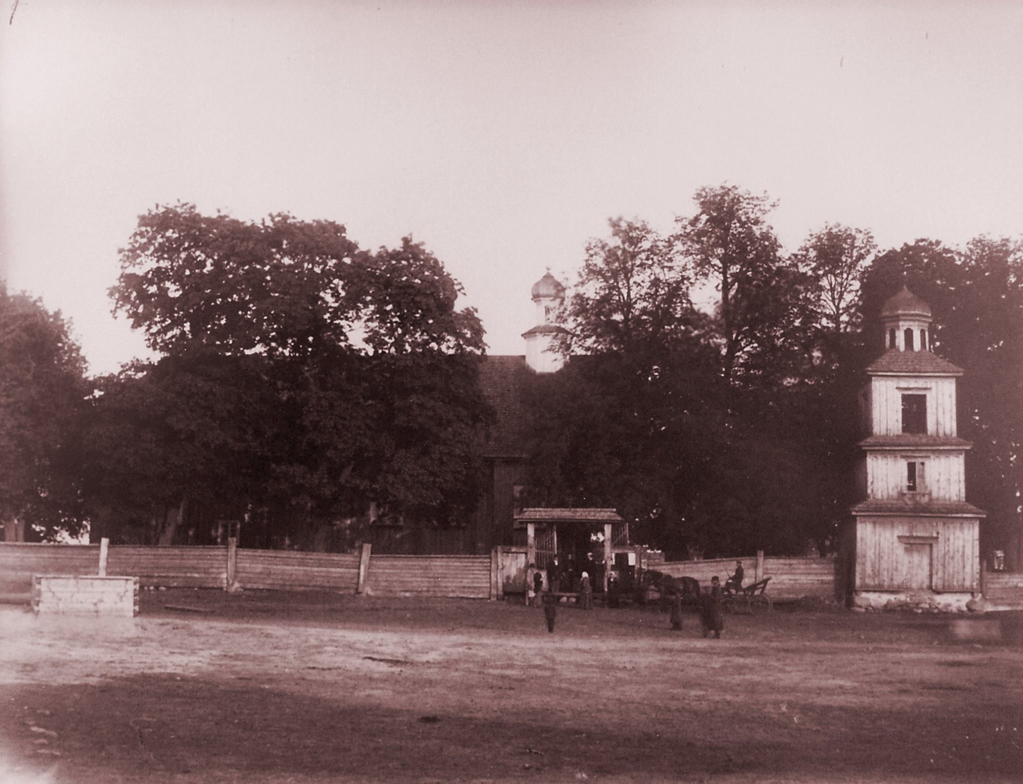 Беларуская (тарашкевіца): Докшыцы (Dokšycy), пляц Рынак (plac Rynak). Касьцёл